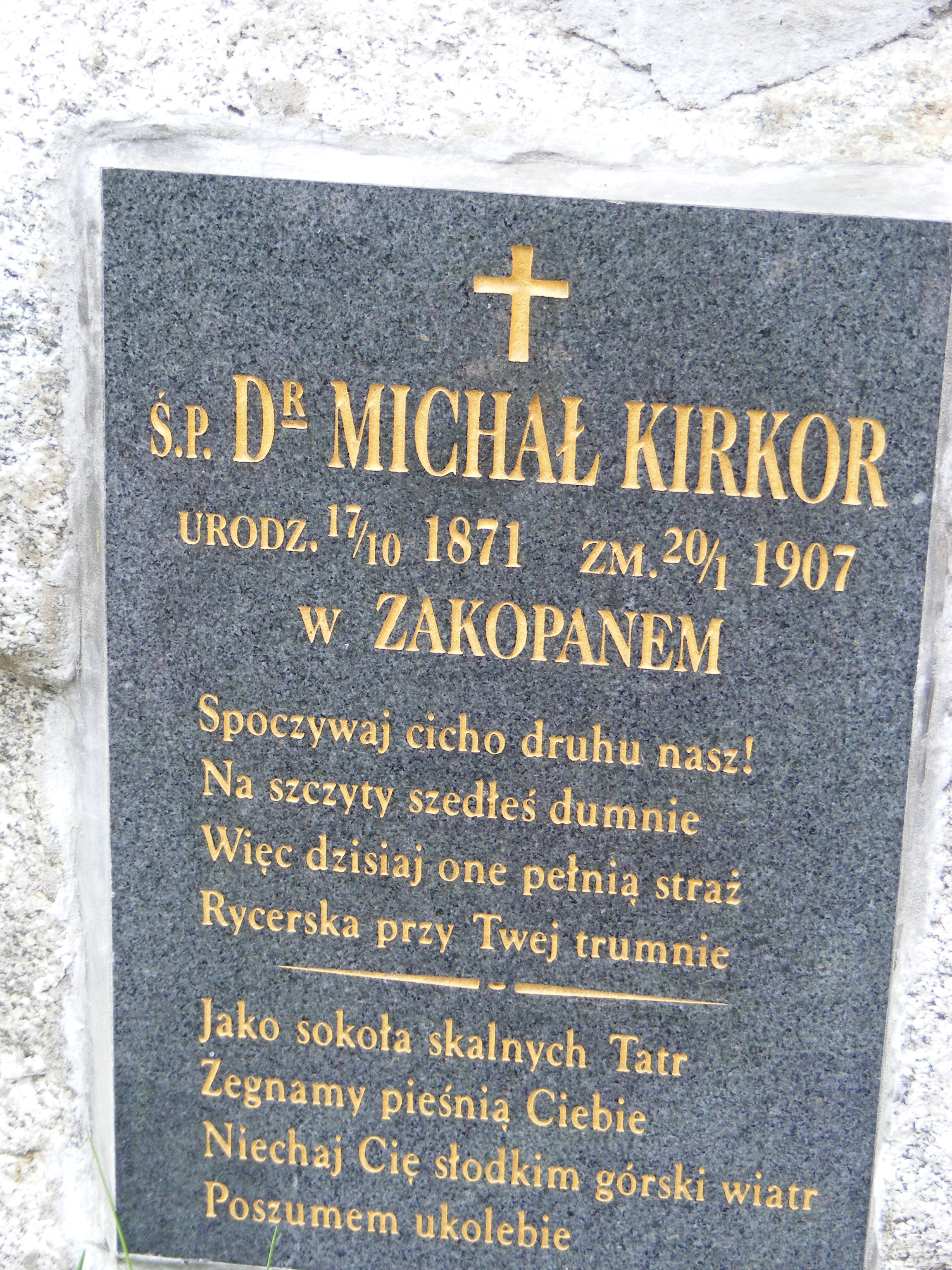 Pęksowy Brzyzek - National Cemetery in Zakopane - tablica na grobie Michała Kirkora